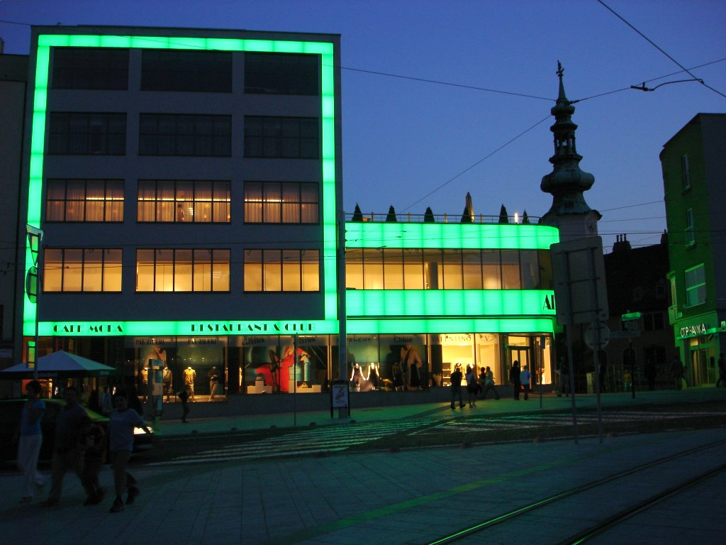 Veľký Baťa (Alizee)